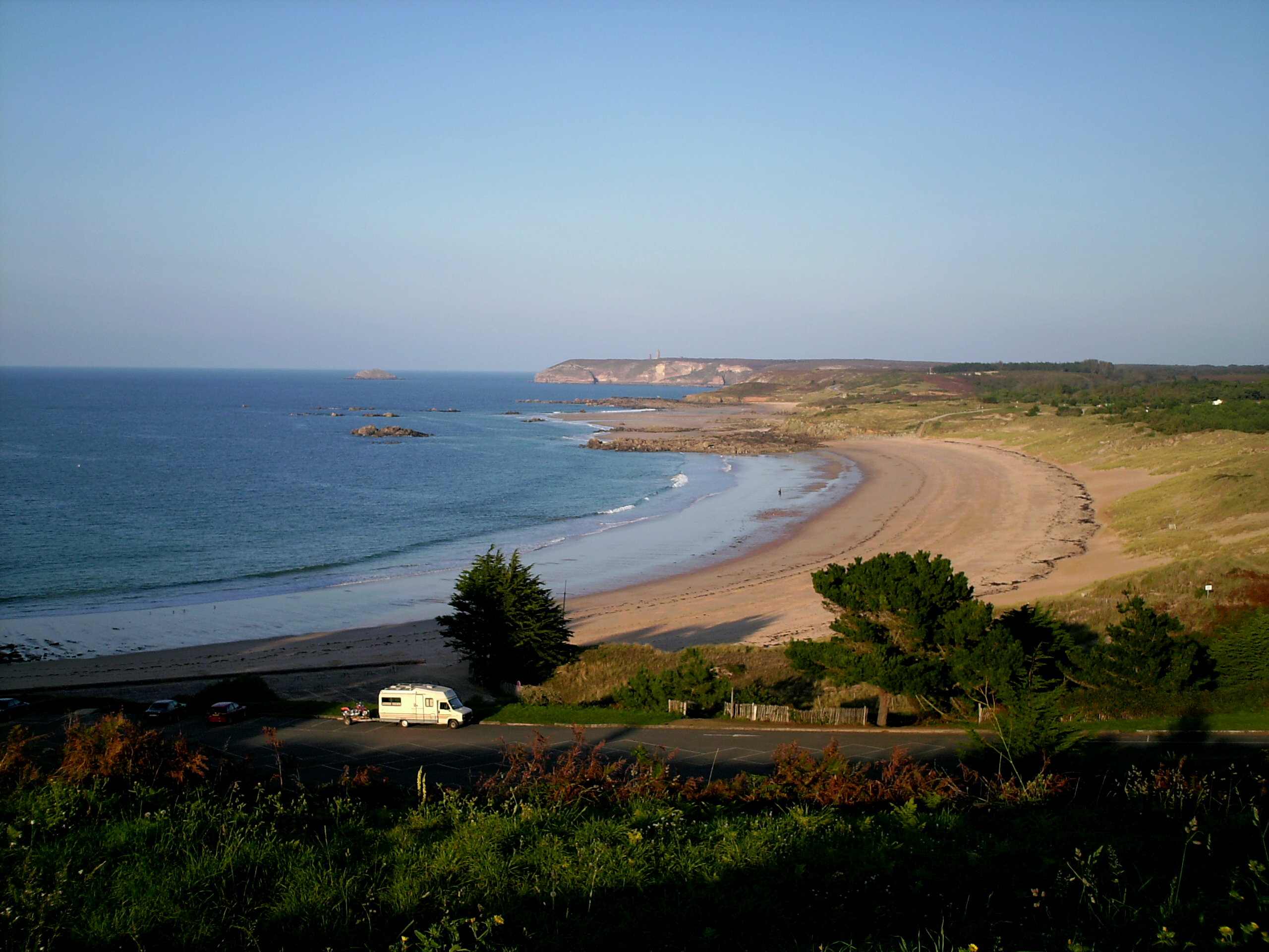 Pléhérel Plage - Anse du Croc. (Fréhel, Côtes-d'Armor, région Bretagne).